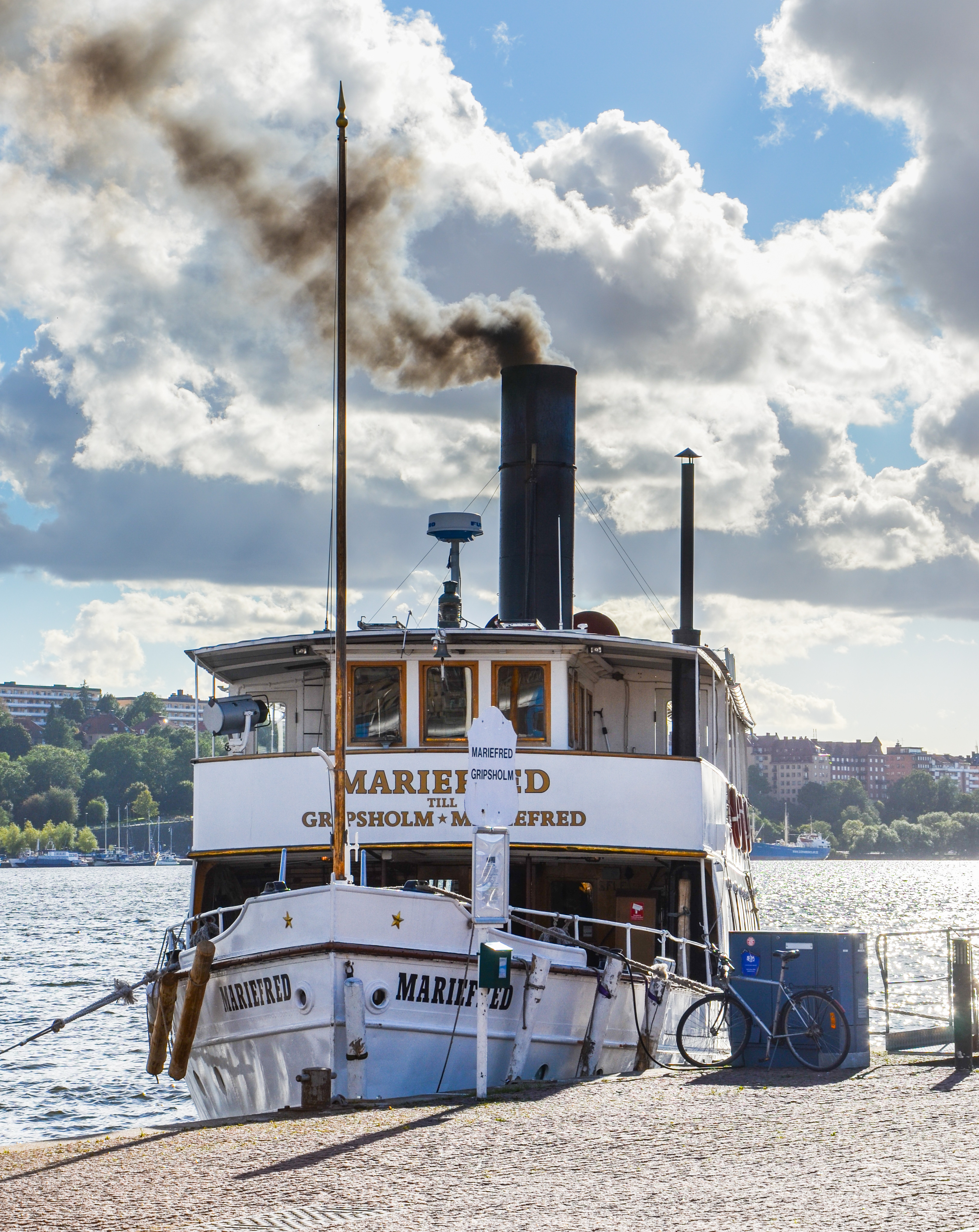 S/S Mariefred vid Stadshuskajen This is an image of the protected Swedish ship S/S Mariefred, with call sign SFLE .